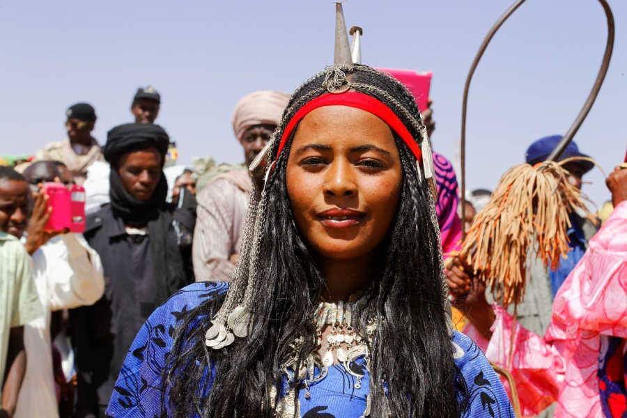 Femme Gorane en tenue traditionnelle This is an image of music and dance from Chad